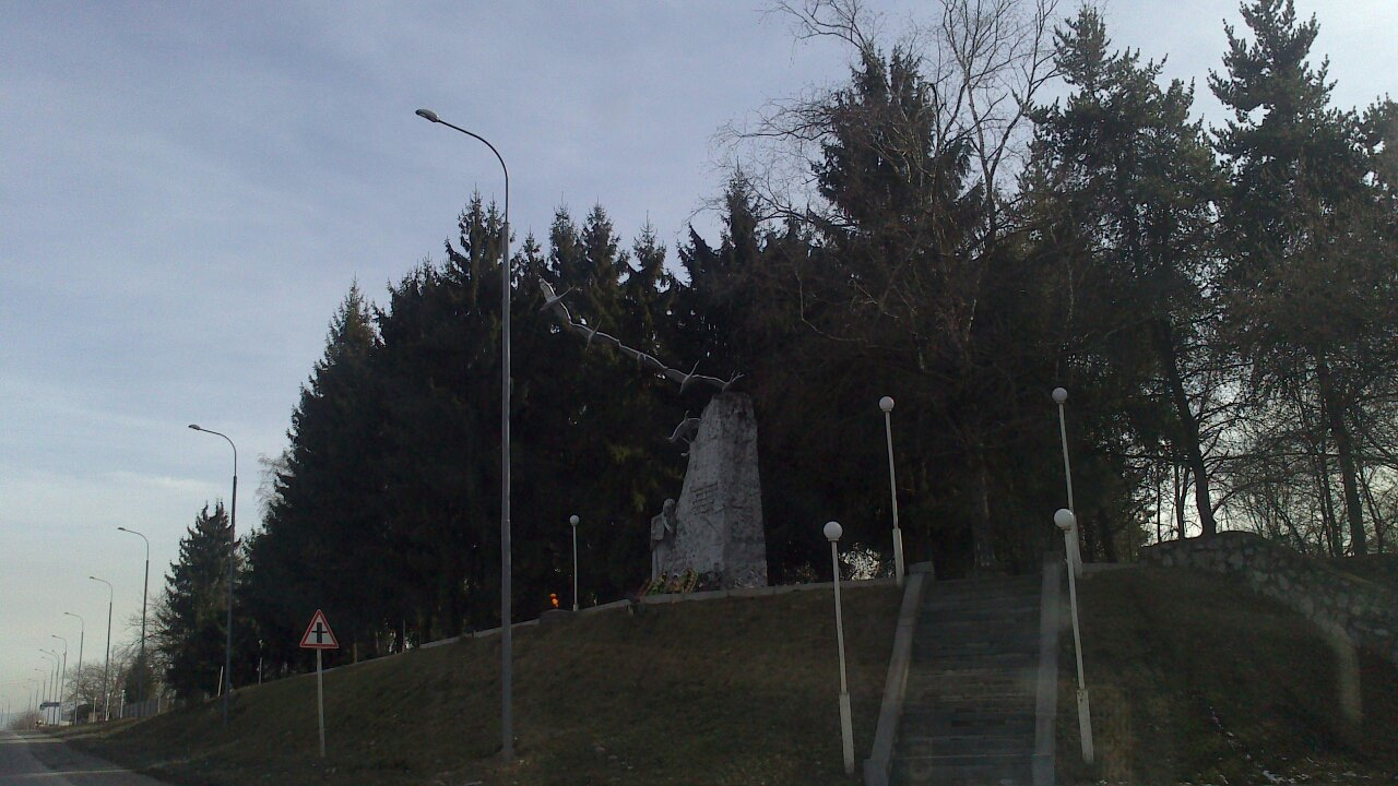 Дорога и памятник братьям Газдановым у села Дзуарикау. Скульптор — Сергей Санакоев